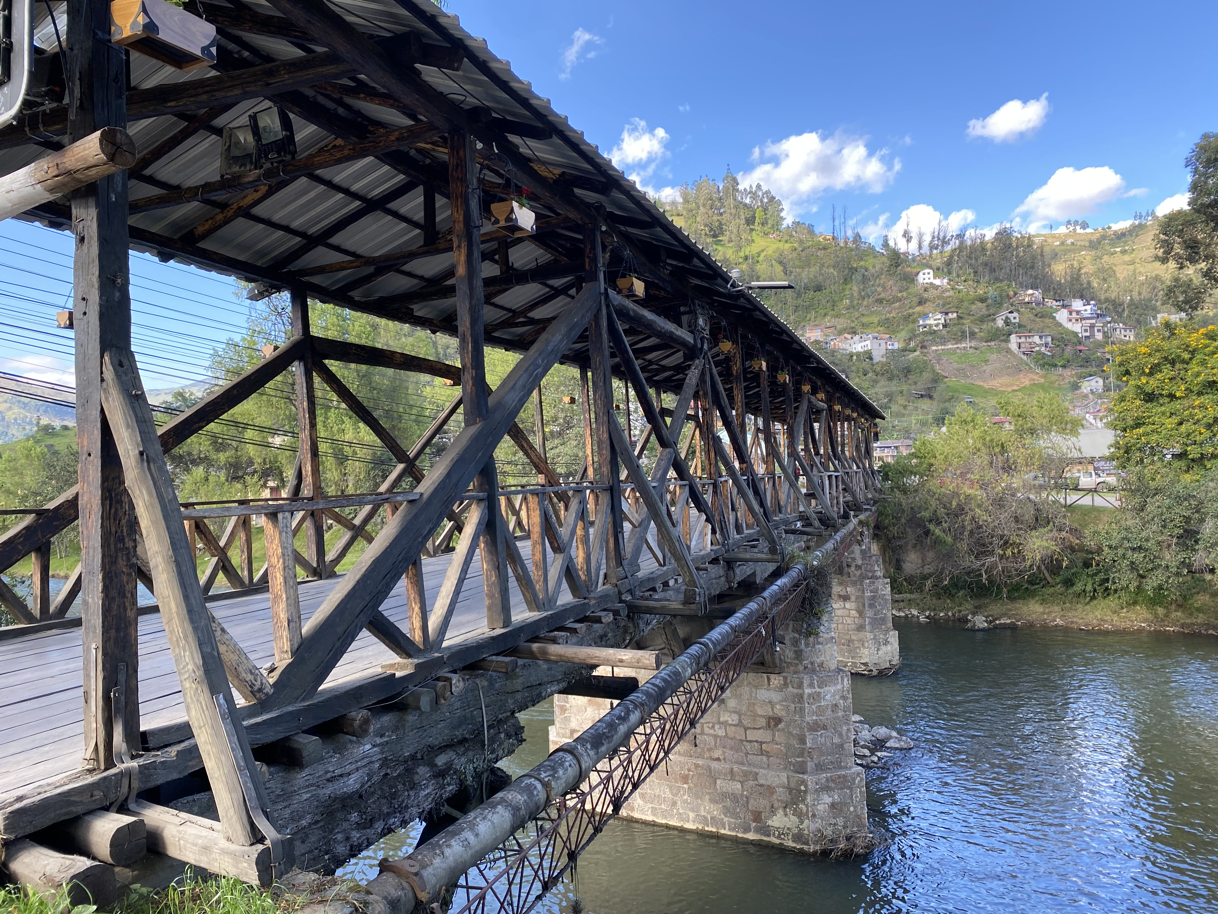 Puente ubicado en la Av. 3 de noviembre en el Cantón Gualaceo, provincia del Azuay